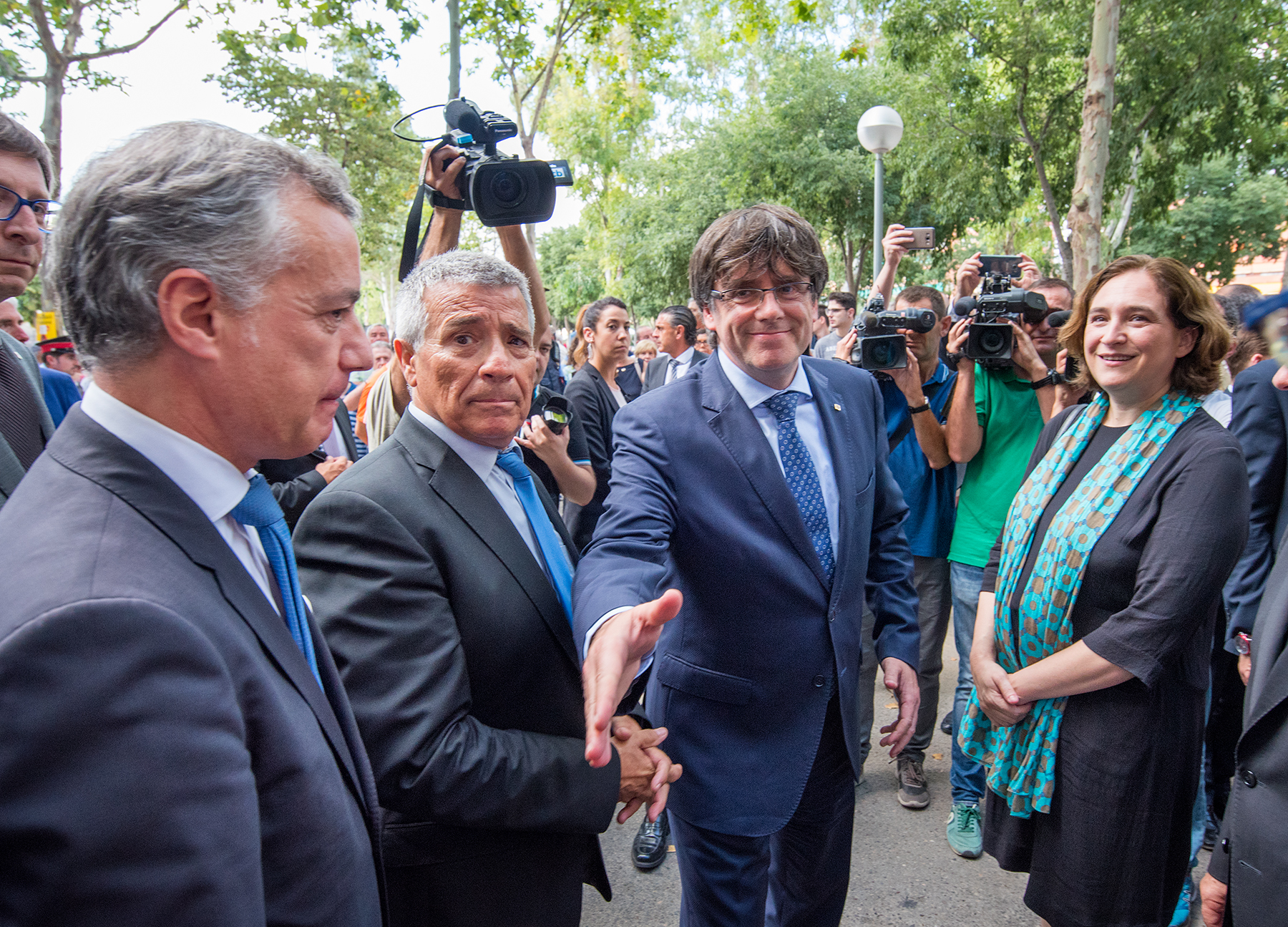 El Lehendakari Iñigo Urkullu ha asistido a la concentración organizada en Barcelona con motivo del 30 aniversario del atentado de Hipercor perpetrado por ETA, en el que fallecieron 21 personas y otras 45 resultaron heridas. La cita ha sido convocada por la Asociación Catalana de Víctimas de Organizaciones Terroristas y en ella el Lehendakari ha estado acompañado por el secretario general de Derechos Humanos, Convivencia y Cooperación, Jonan Fernández. El acto de recuerdo se ha desarrollado en el monumento dedicado a todas las víctimas del terrorismo situado en la Avenida Meridiana.